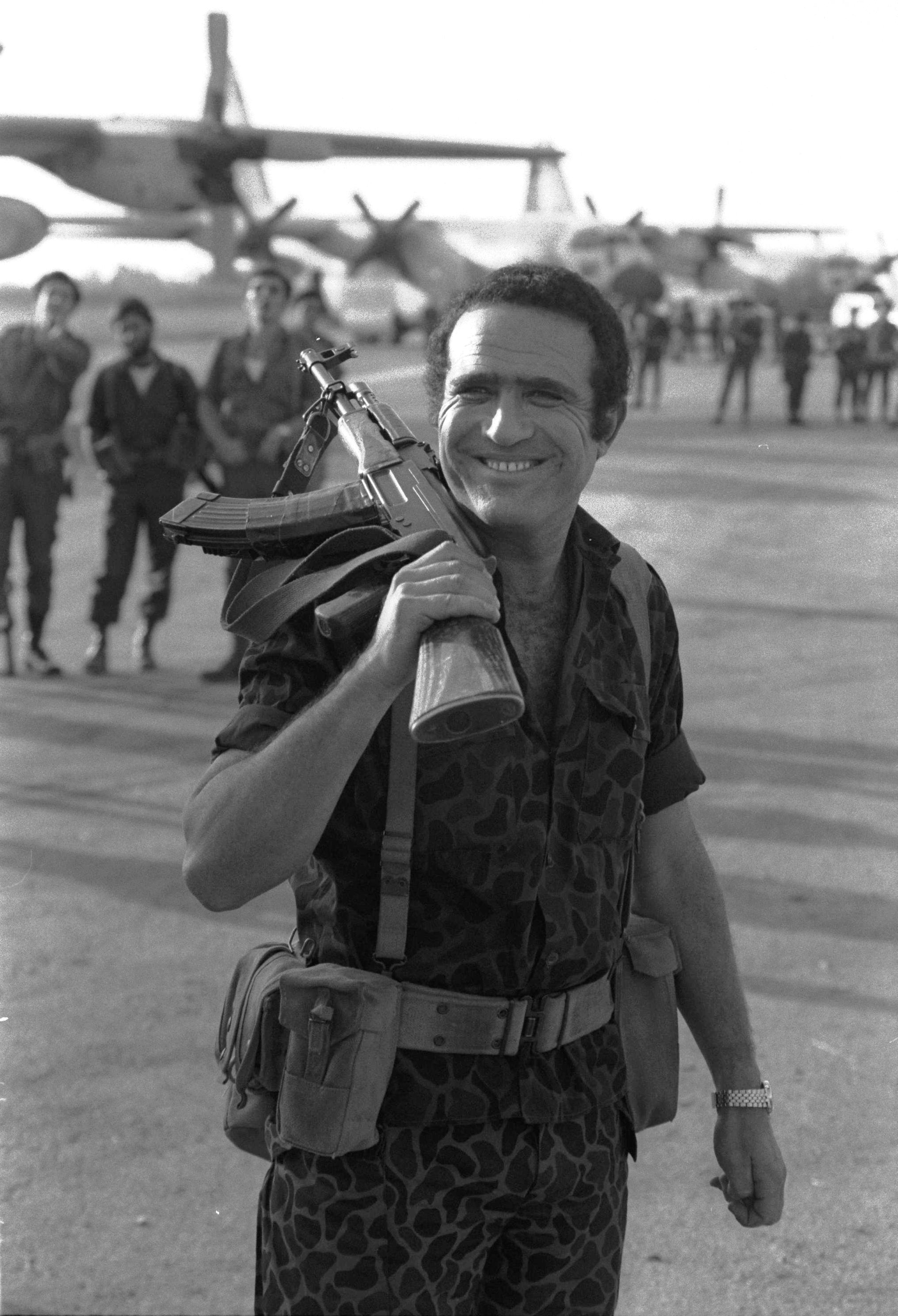 Actor/singer Yehoram Gaon in the role of Yoni Netanyahu in Menahem Golan's "Mivtsa Yonatan" film. השחקן והזמר יהורם גאון בתפקיד יוני נתניהו בסרטו של גולן "אנטבה".